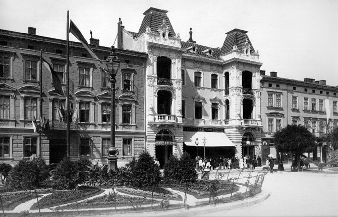 Будинок № 10, початок XX ст.: вулиця Академічна